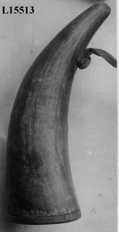 Salthorn fra Nord-Fron i Oppland, datert 1722. Foto Norsk Folkemuseum NF.1899-0111.